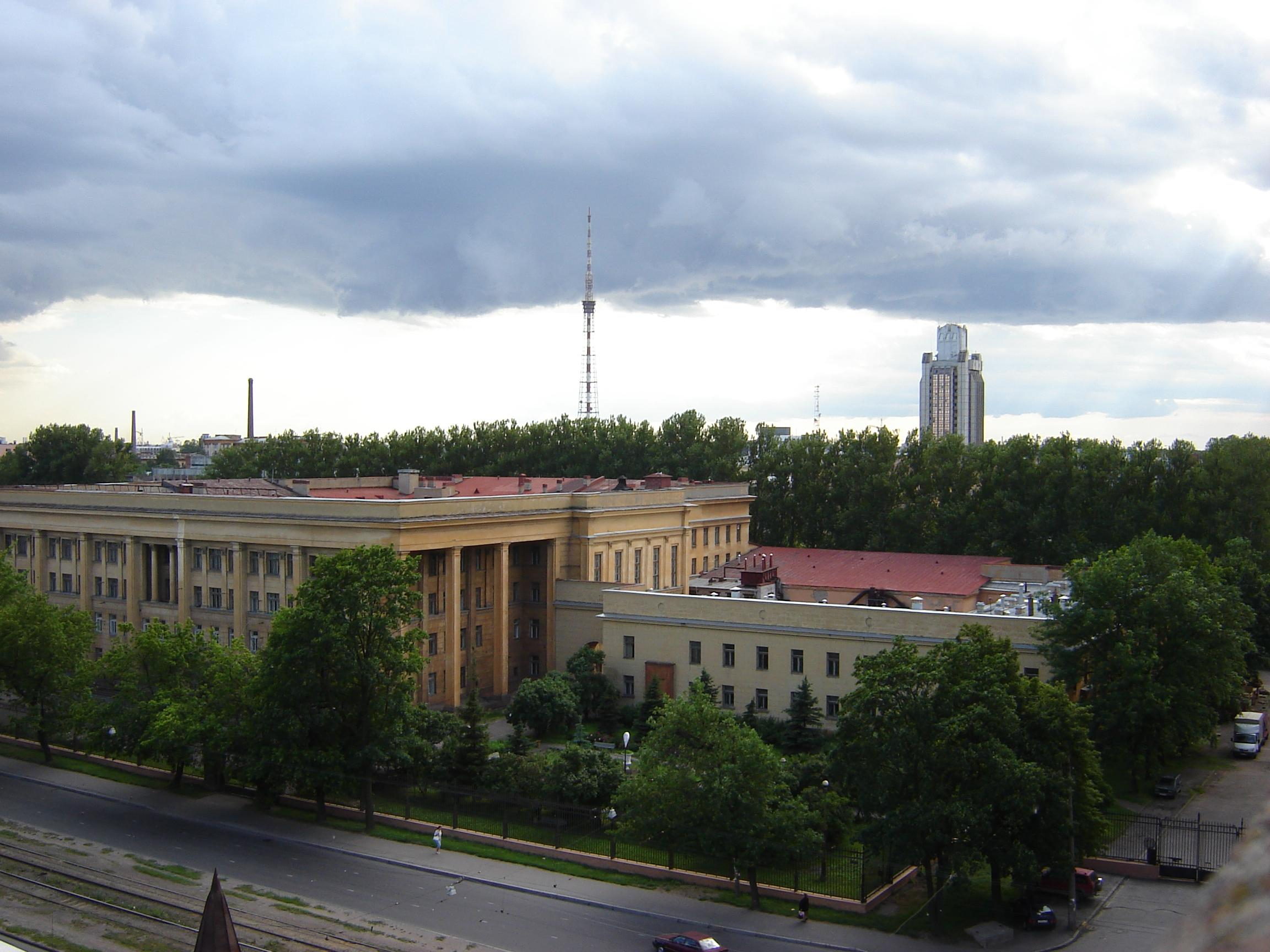 В предверье лета. Вид на бывшее здание Конструкторского бюро специального машиностроения (на переднем плане) на Лесном проспекте в Выборгском районе Санкт-Петербурга